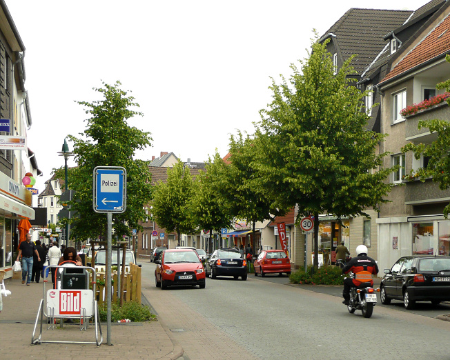 Seelze